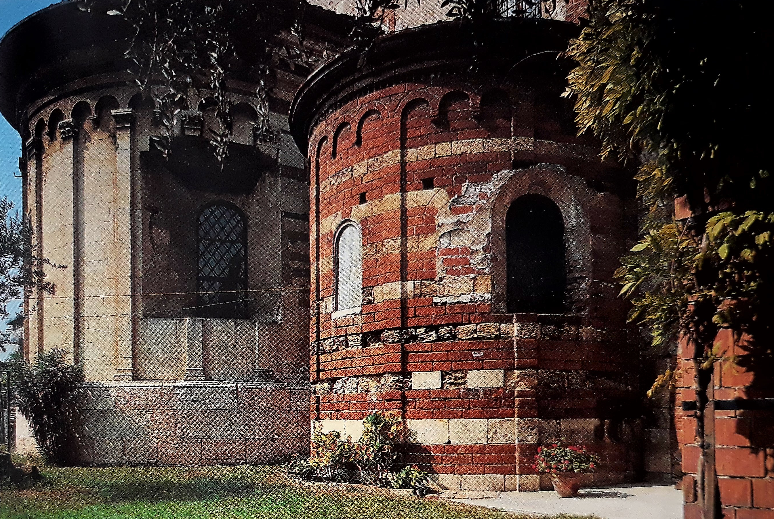 Absidi della chiesa della Santissima Trinità in Monte Oliveto a Verona